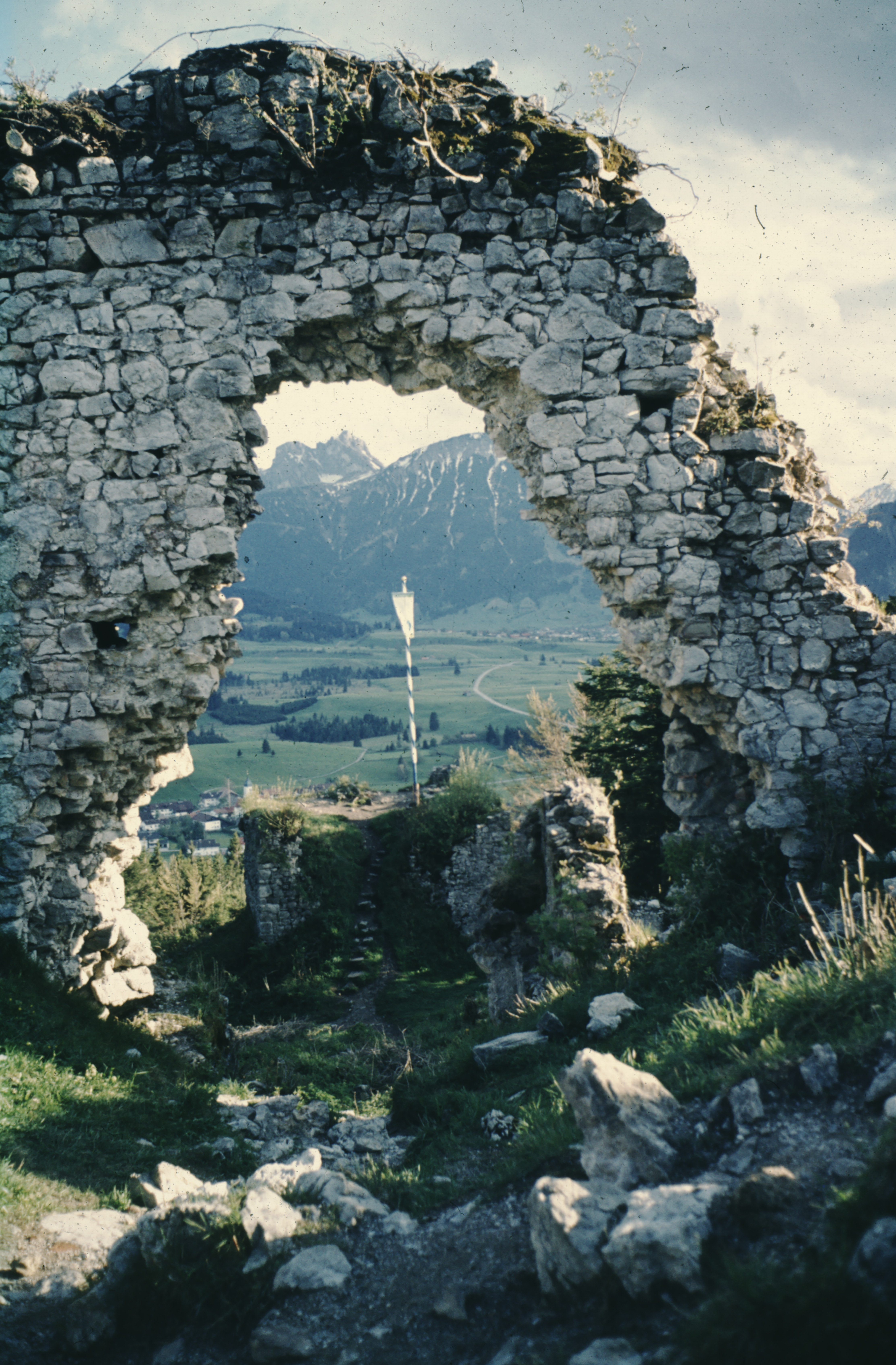 Das südliche Tor zur Burg Eisenberg vor den Erhaltungsmaßnahmen, 1983